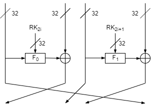 Один раунд обобщенной сети Фейстеля в алгоритме шифрования CLEFIA